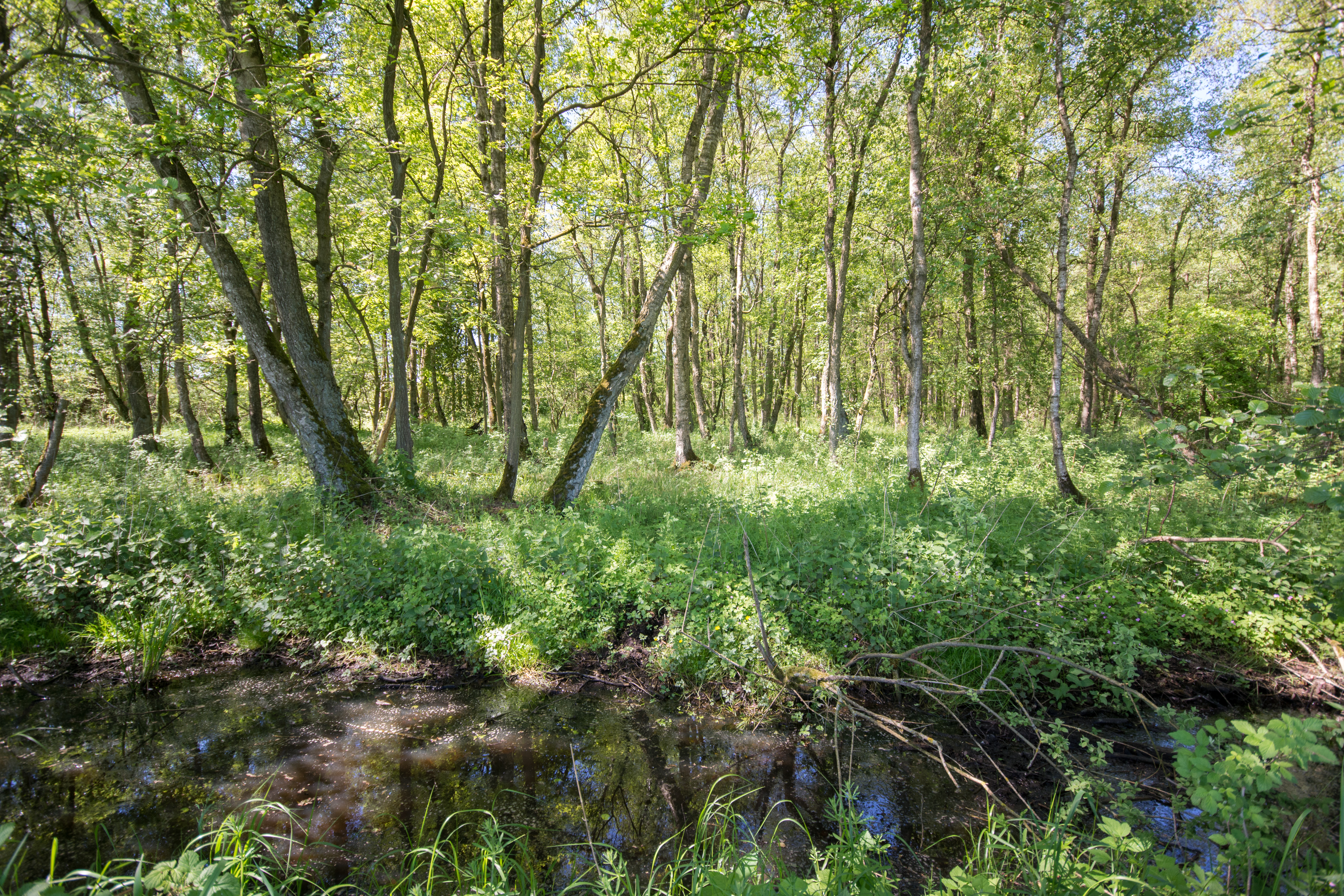 Naturschutzgebiet „Groß Potremser Moor“: Einblick in das Moor bei Groß Potrems